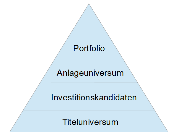 Portfoliomanagementprozess